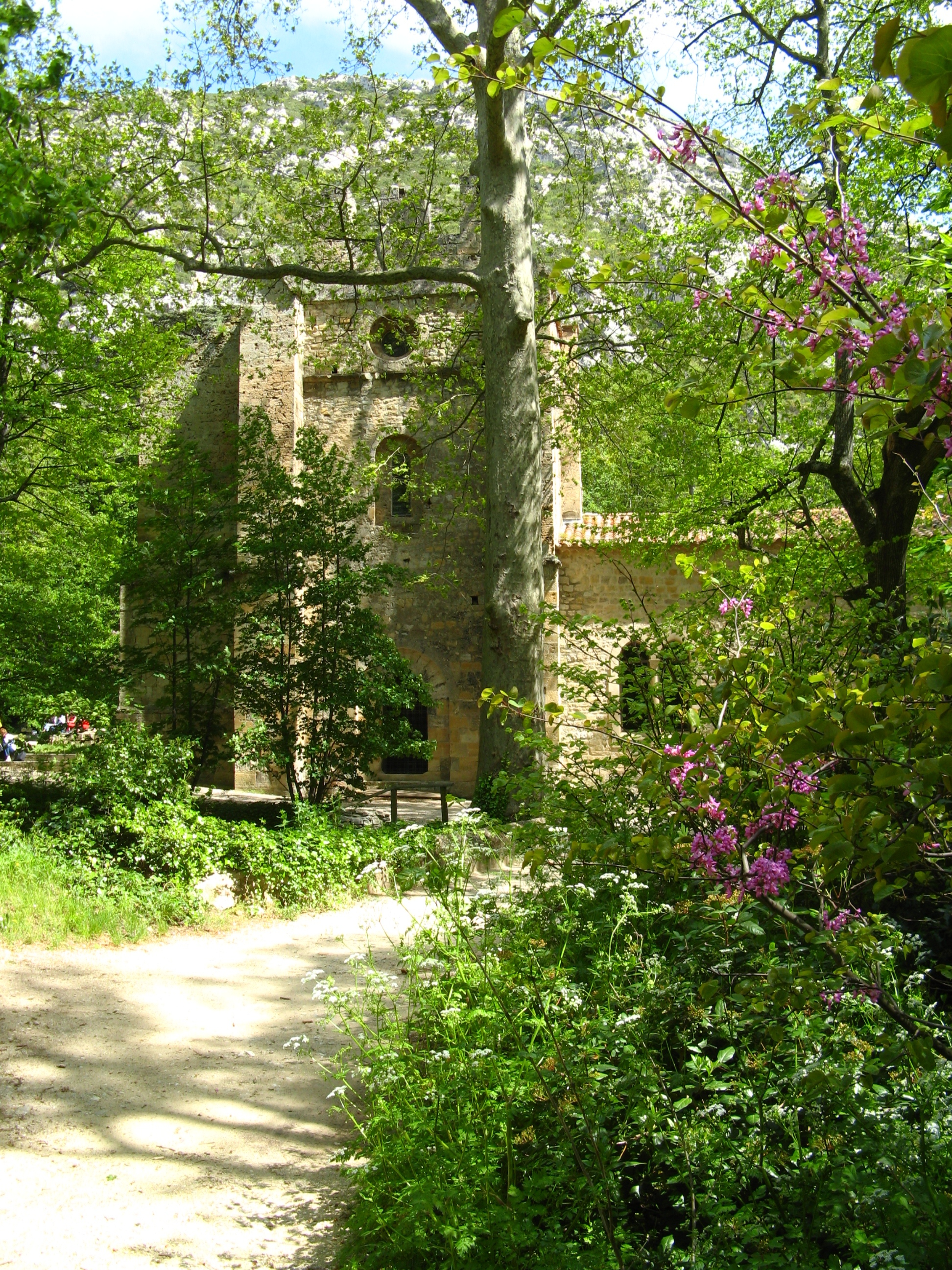 L'abbaye de Saint-Pons, au sein du parc départemental (Gémenos, Bouches-du-Rhône)